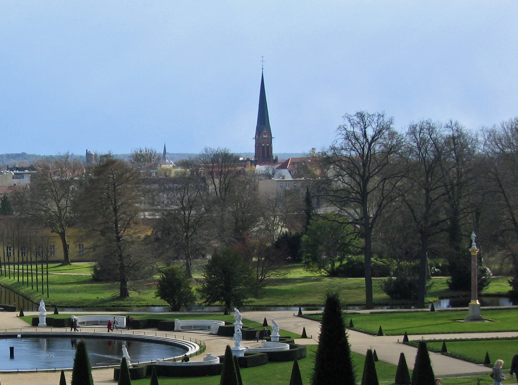 Die Erlöserkirche in Potsdam aus der Distanz vom Schloss Sanssouci gesehen.